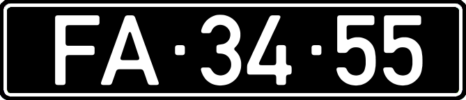 Номерний знак Кабо-Верде